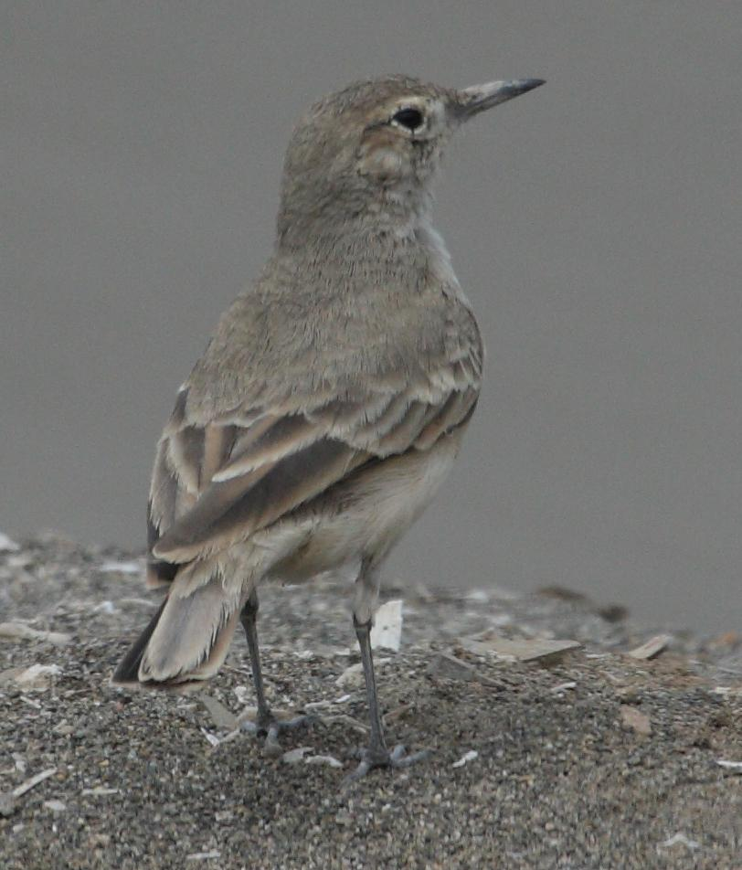 Coastal Miner in Peru